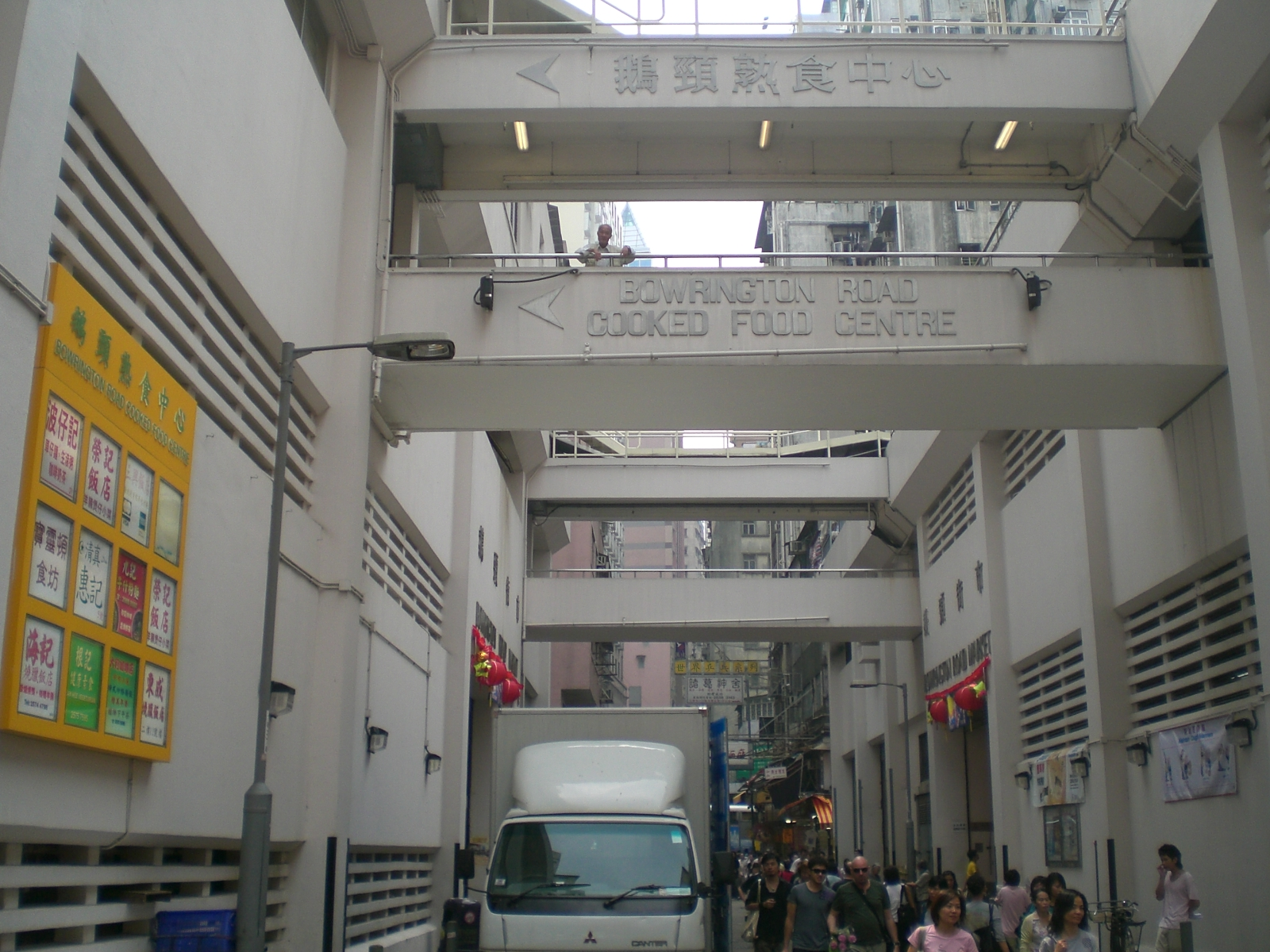 寶靈頓道, 鵝頸街市近灣仔道